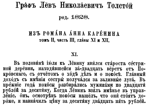 Прижизненное издание с последовательным употреблением буквы ё, отражающее традиционное (старомосковское) произношение имени Л. Н. Толстого (Лёв) и фамилии персонажа «Анны Карениной» (Лёвин) — «Русская христоматия с русско-чешско-сербским словоуказателем» под редакцией П. А. Лаврова и В. Н. Щепкина (1894)[1] ↑ Русская христоматия : С русско-чешско-сербским словоуказателем / ред.-сост. П. А. Лавров, В. Н. Щепкин. — Прага : Эдуард Валечка [Типография д-ра Эд. Грегра], 1894. — С. 161—168.